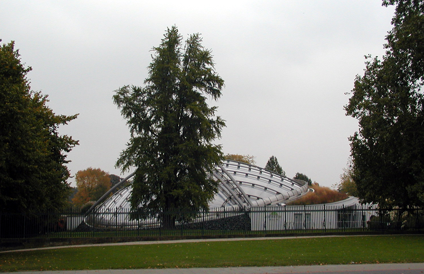 Das Regenwaldhaus in den Herrenhäuser Gärten